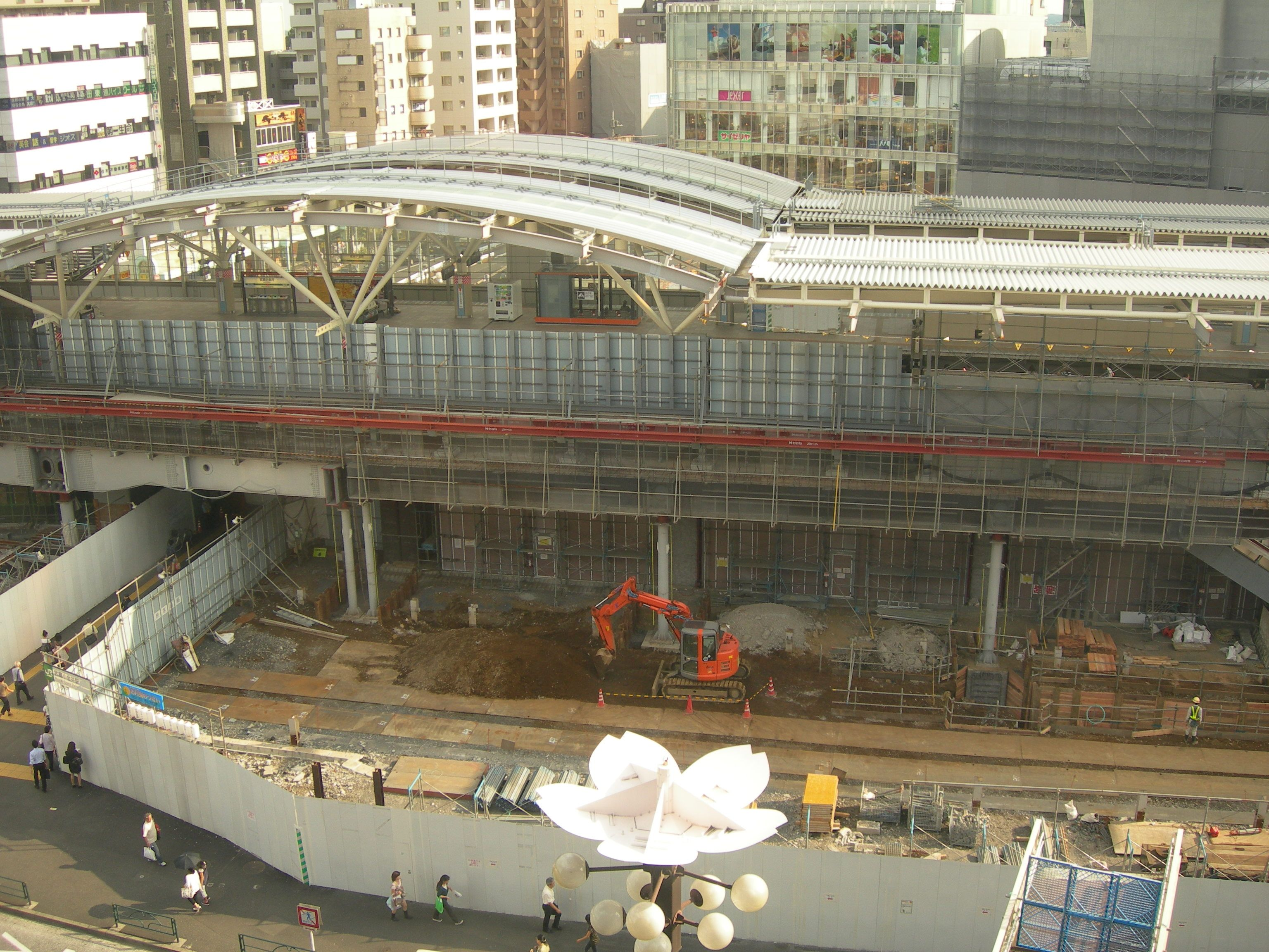 武蔵小金井駅北口